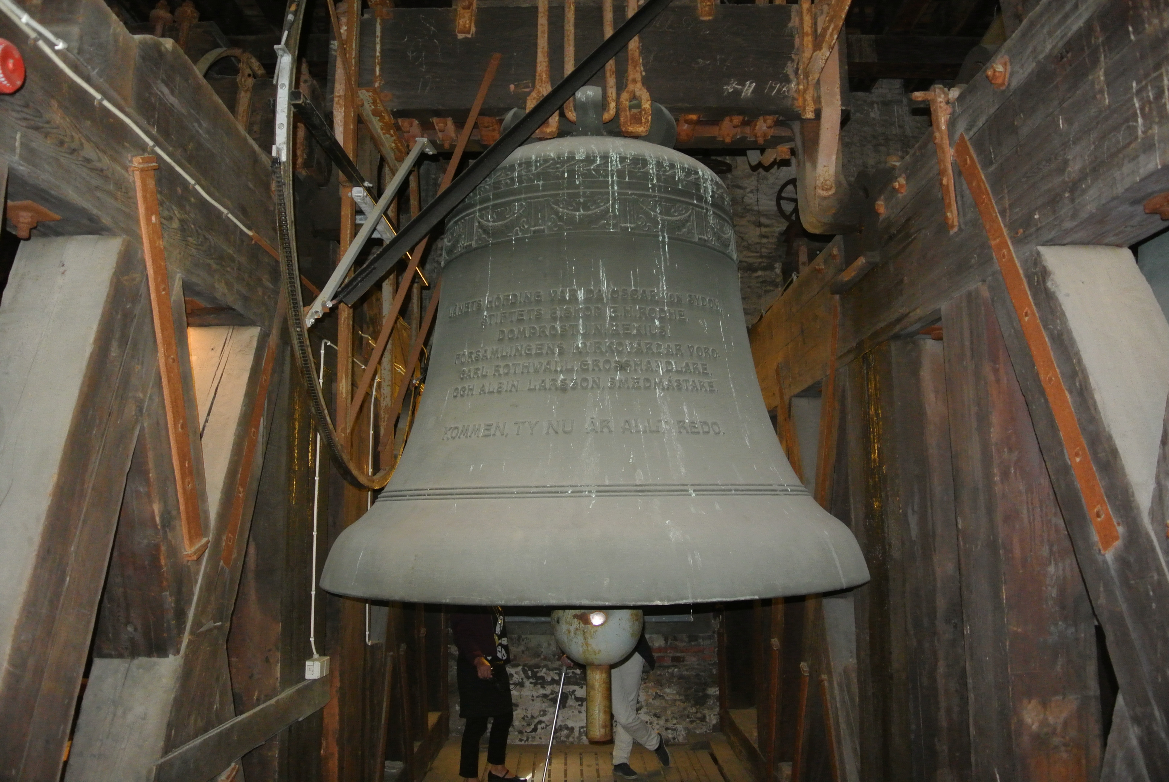 Storklockan i Göteborgs domkyrka